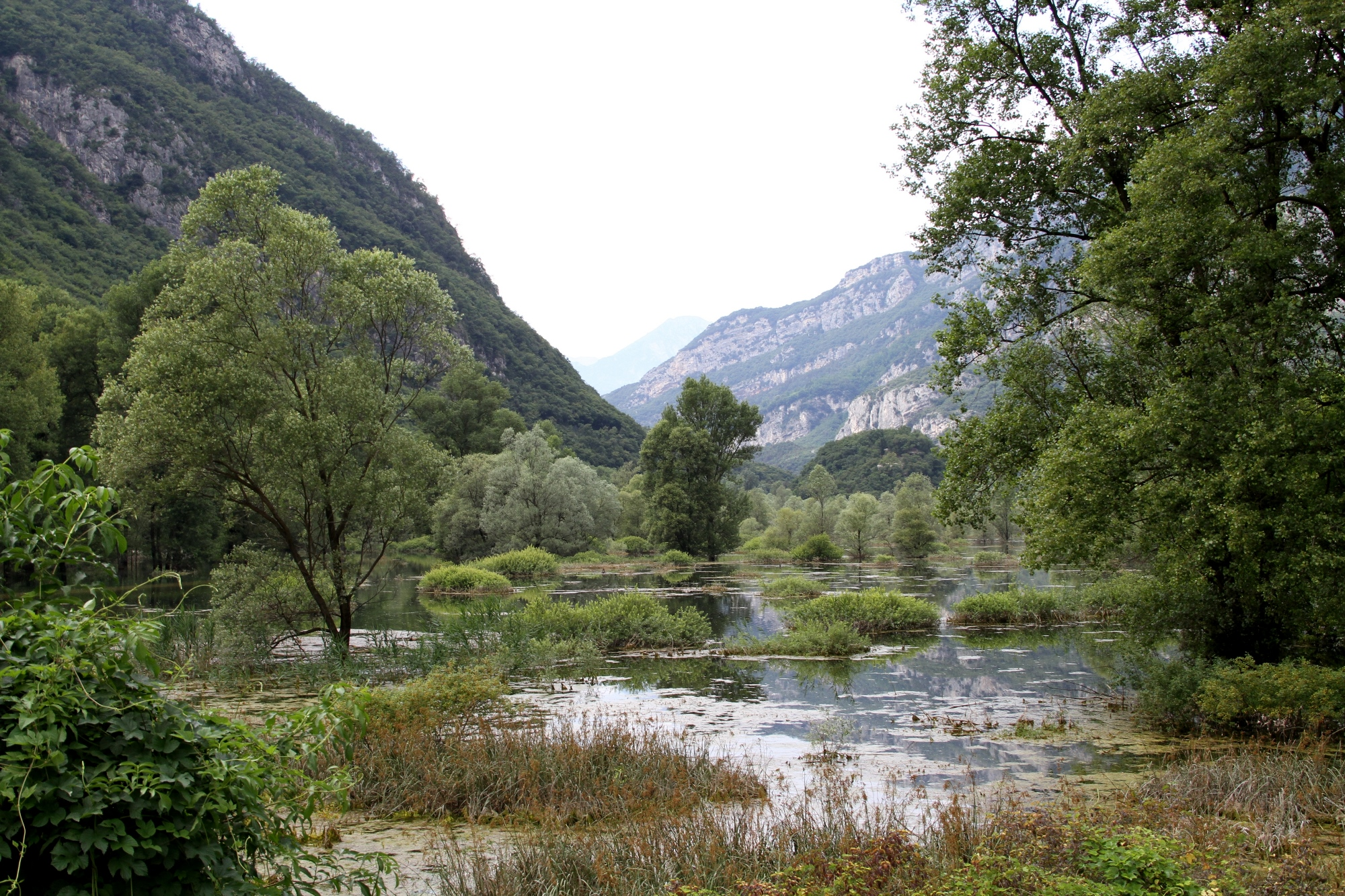 Isola di Sant'Andrea This is a photo of a monument which is part of cultural heritage of Italy.